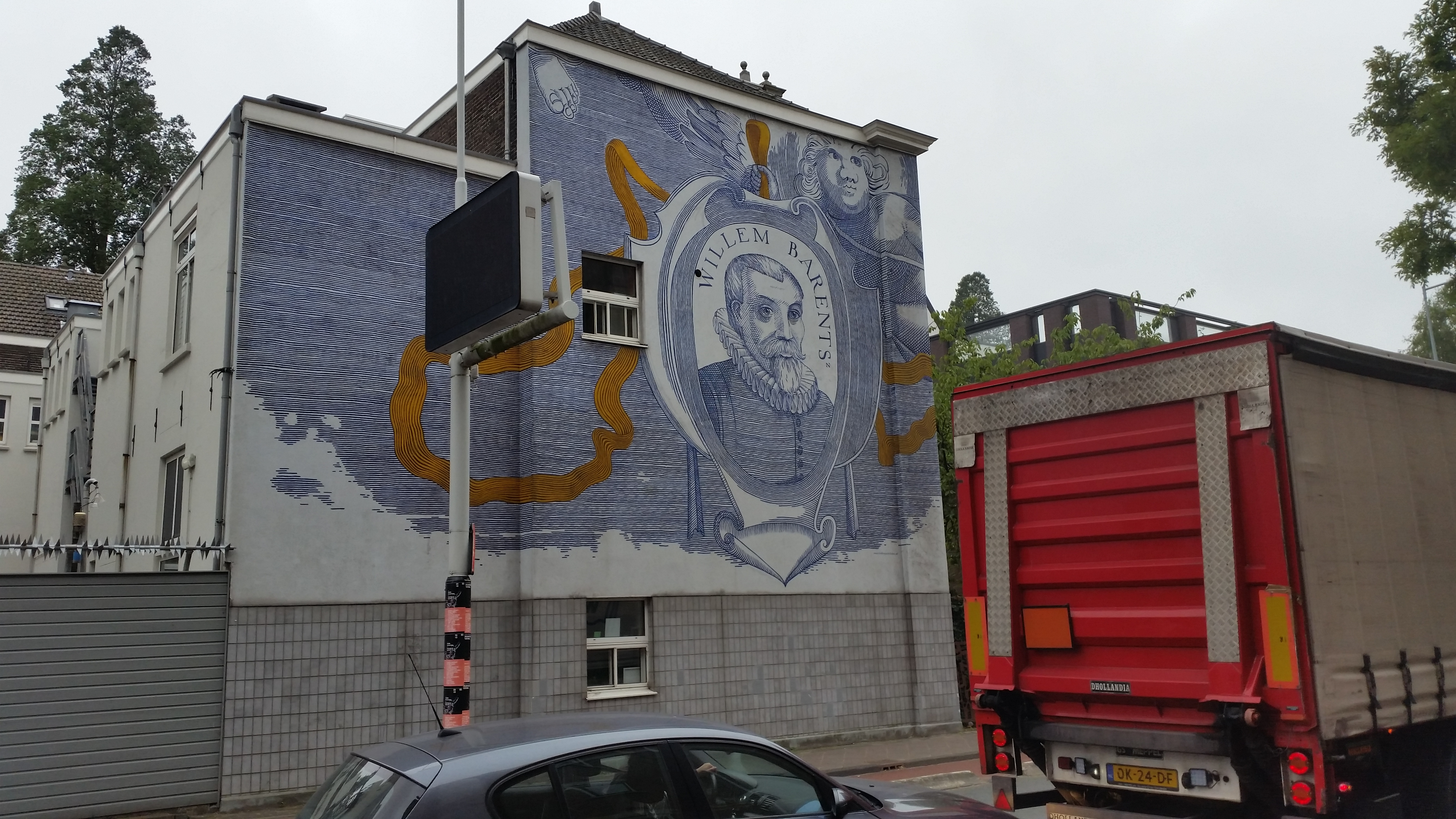 Muurschildering De Roggeveen; vierde tableau